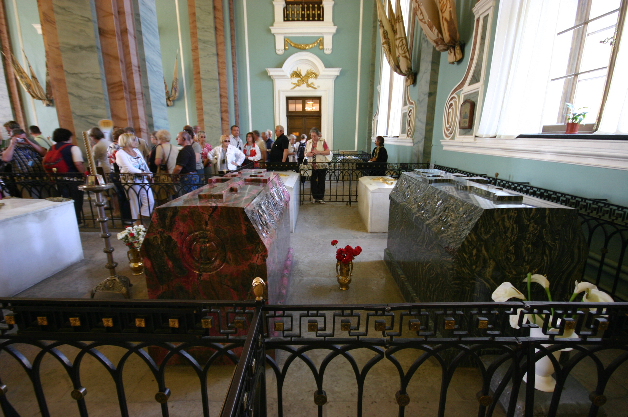 Sarkophag Alexander II und dessen Frau